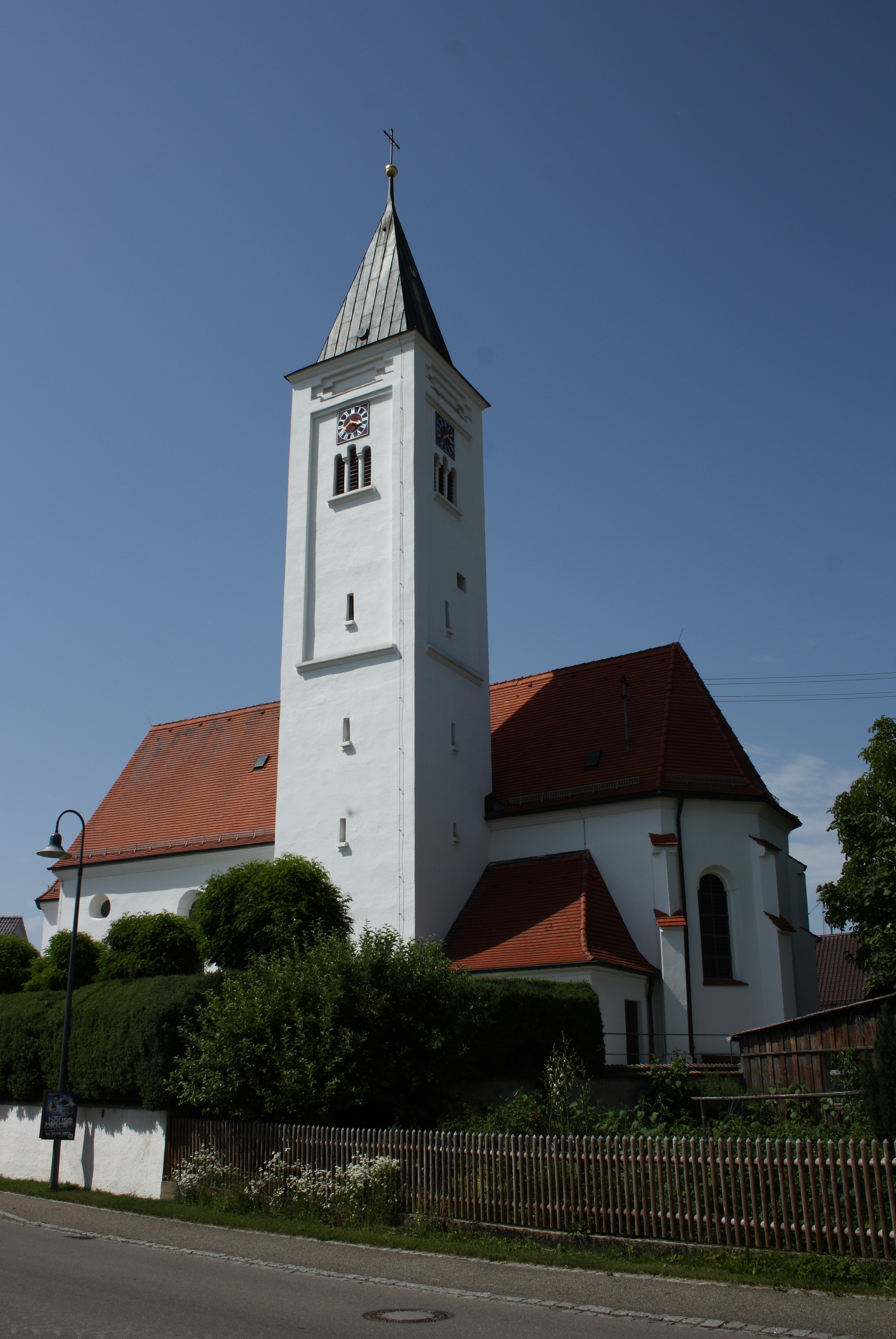 Katholische Pfarrkirche Maria Immaculata in Oberwaldbach, einem Ortsteil von Burtenbach im Landkreis Günzburg (Bayern), Chor und Turm 15./16. Jahrhundert, Langhaus 17./18. Jahrhundert